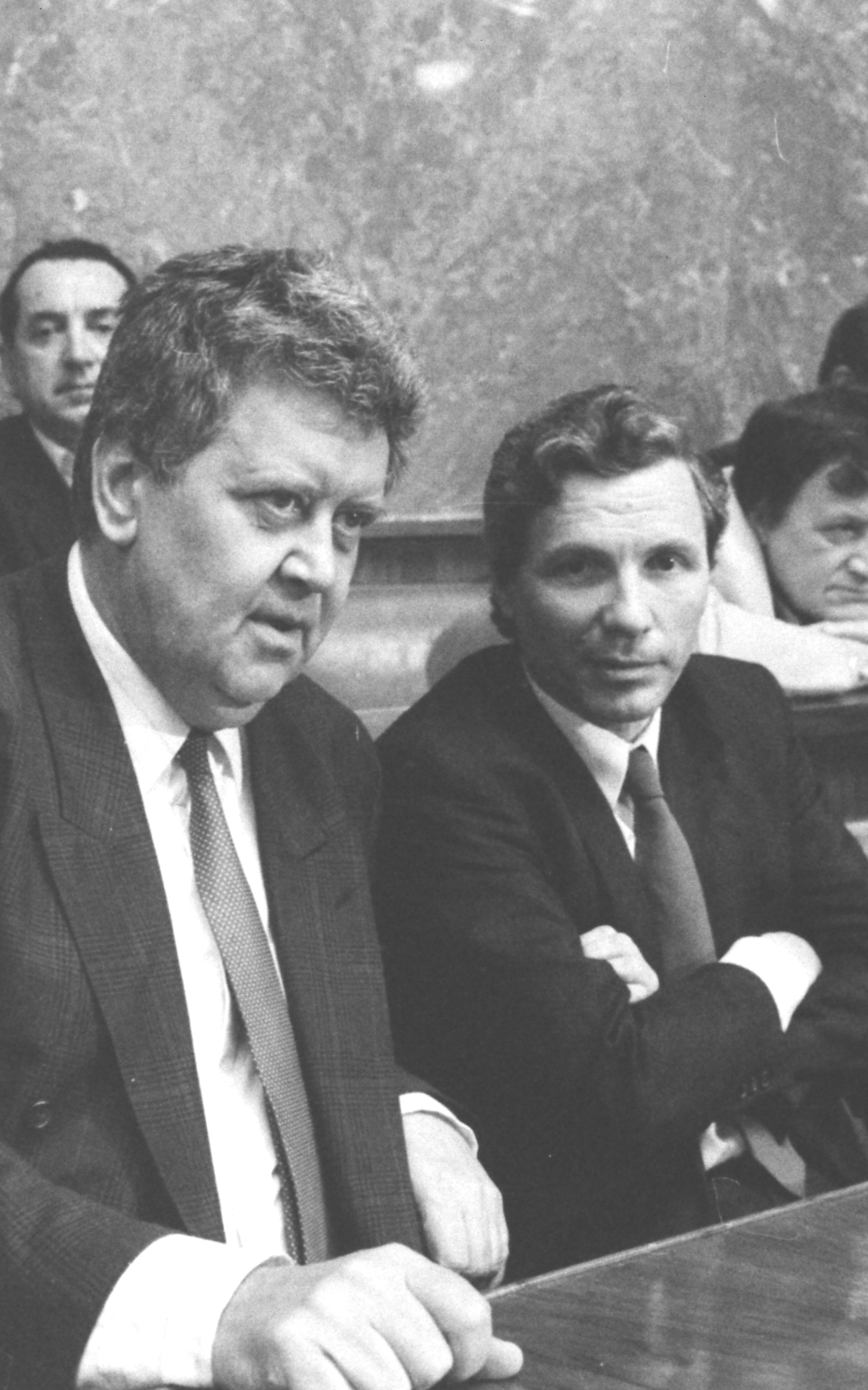 Branislav „Brana“ Crnčević, srpski književnik, aforističar, novinar, scenarista i političar.foto: Stevan Kragujević (po odobrenju Tanje Kragujević)